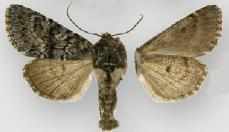 Lasionycta perplexa male